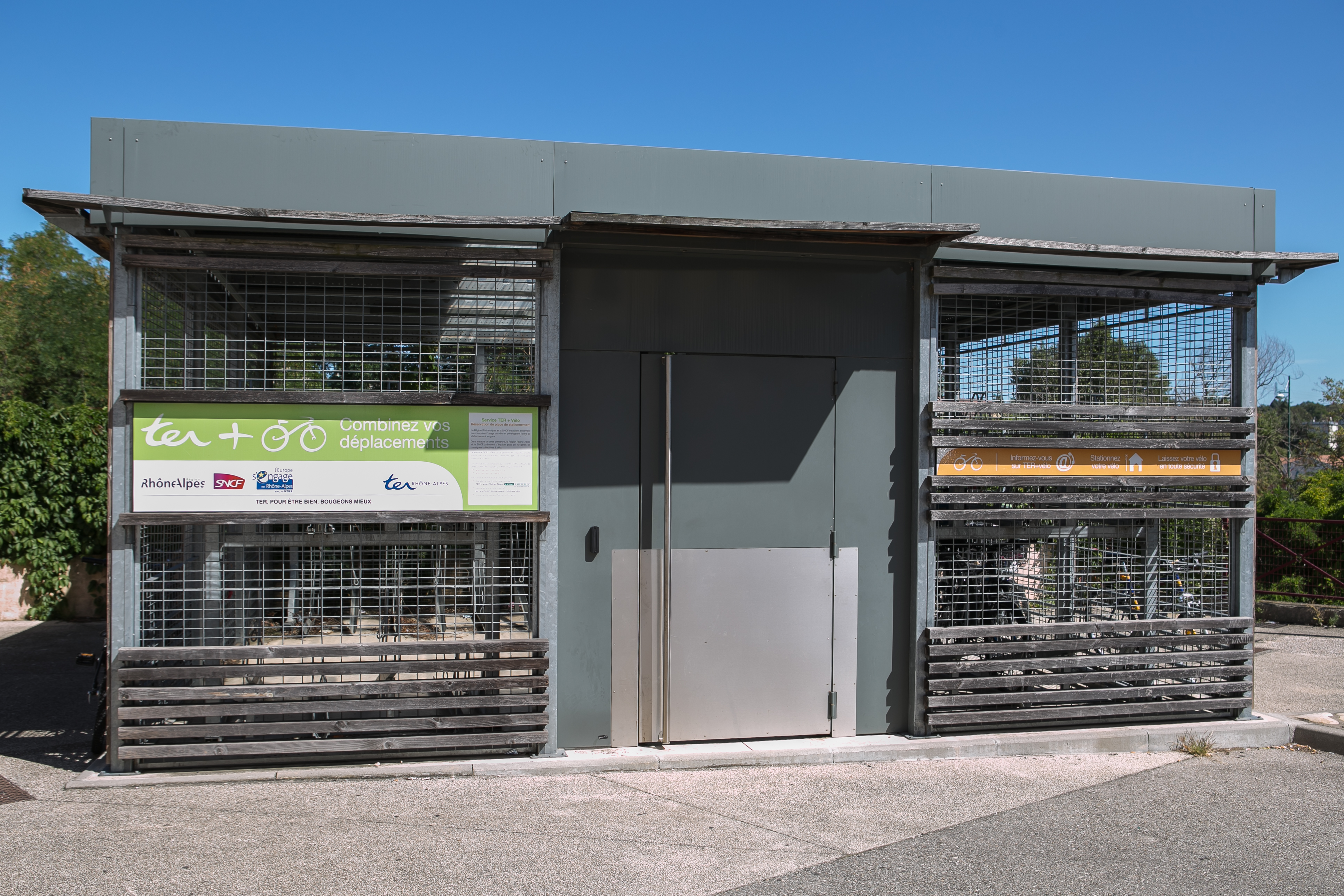 Divers bâtimentsde la gare de Saint-Rambert-d'Albon (Saint-Rambert-d'Albon, Drôme, France)